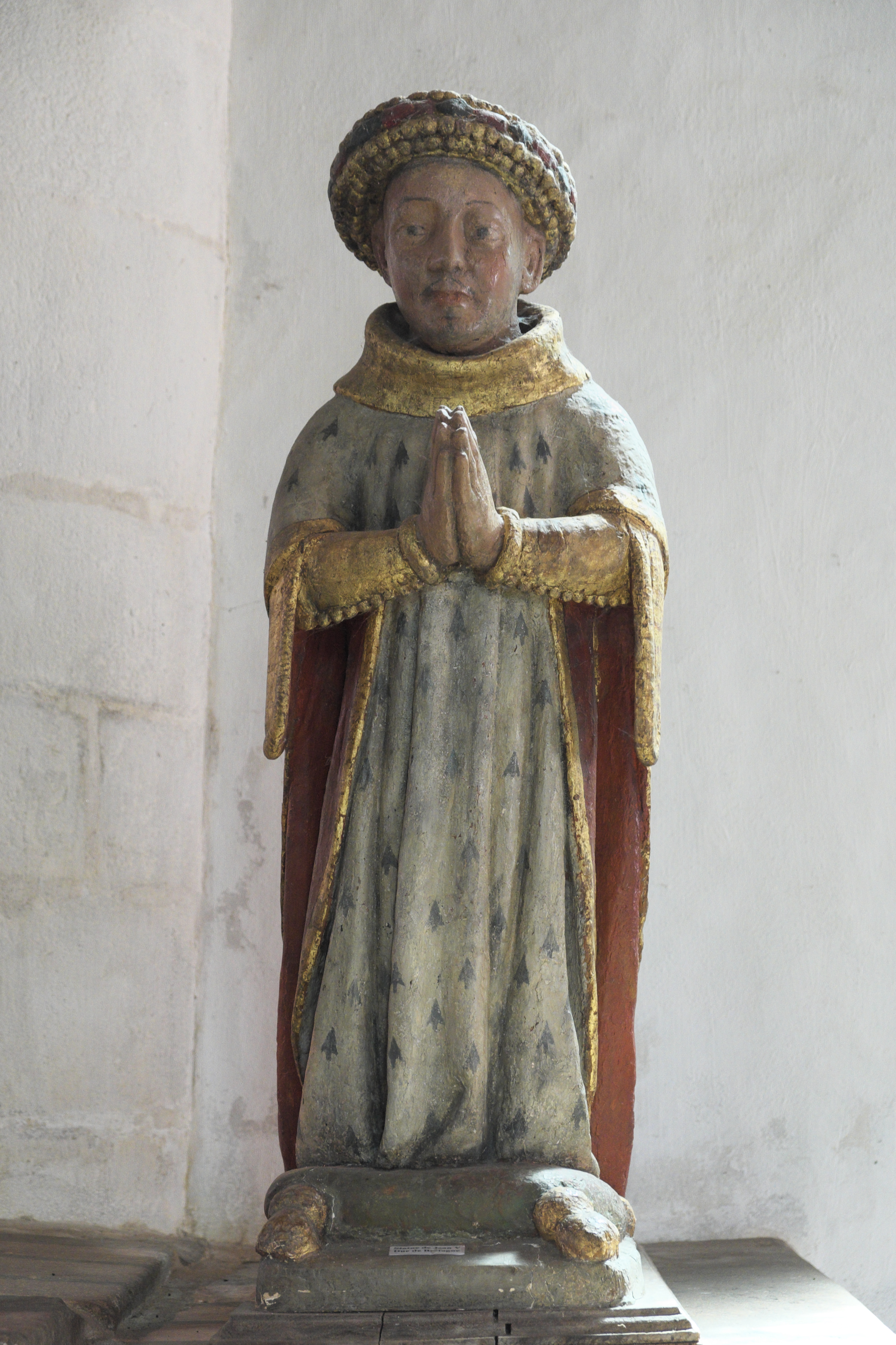 Kapelle Saint-Fiacre in Le Faouët im Département Morbihan (Region Bretagne/Frankreich), Herzog der Bretagne